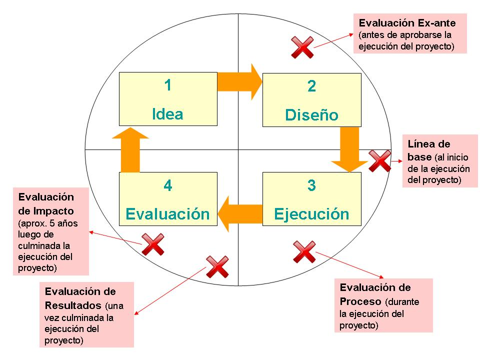 La evaluacion en el ciclo de un proyecto de desarrollo